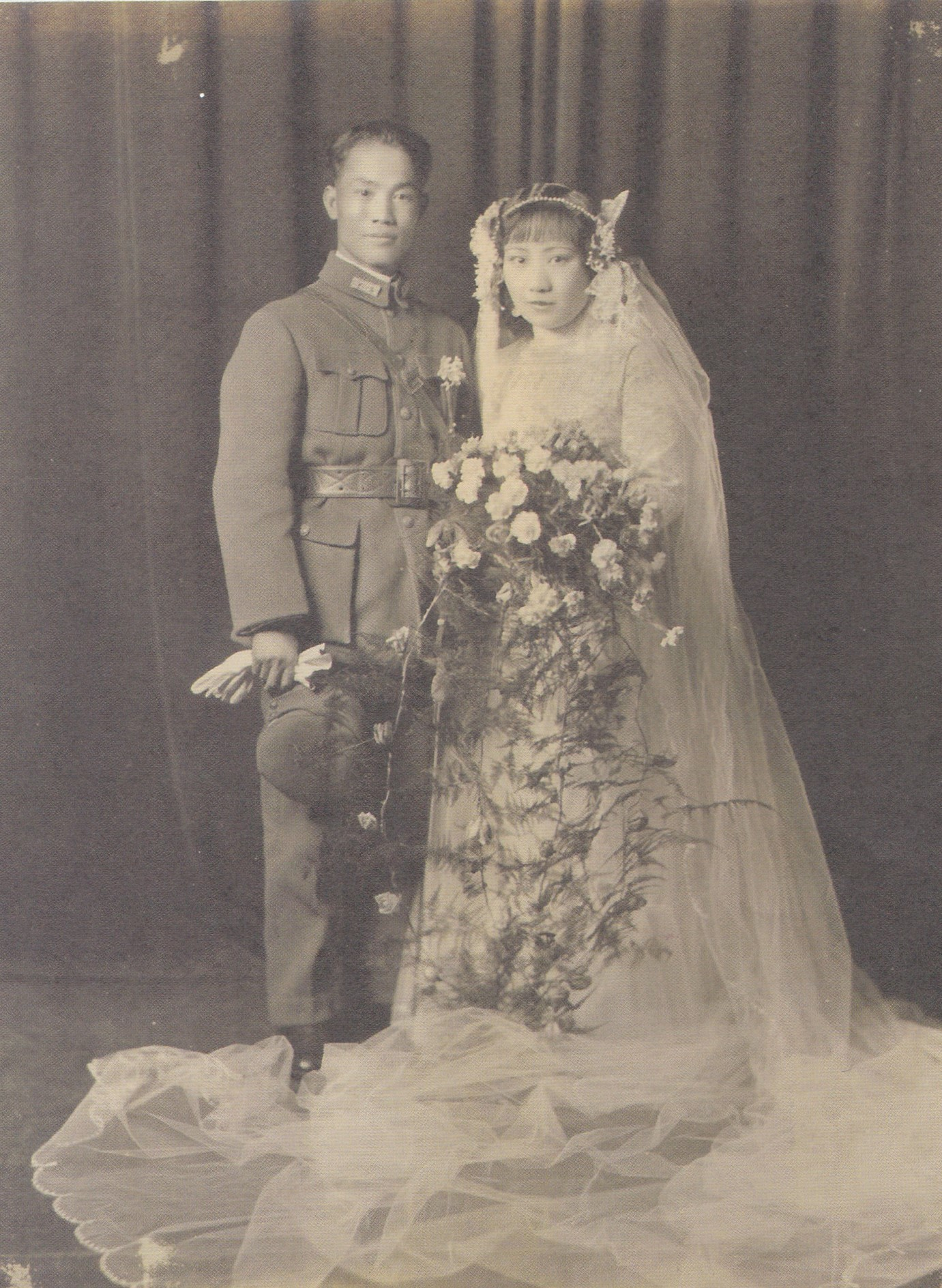 陳誠と譚祥との婚約写真